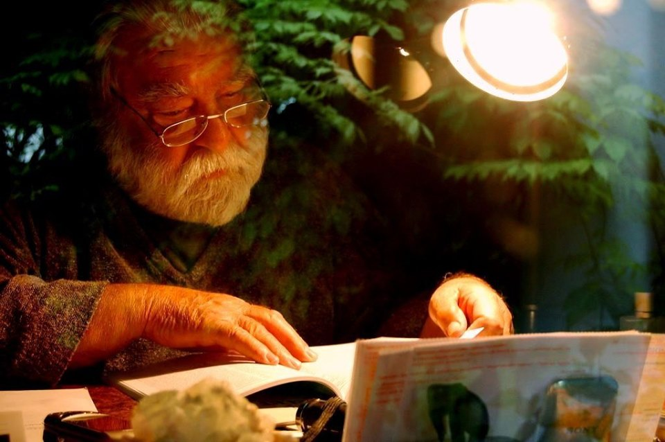 Sára Sándor (Tura, 1933. november 28. –) a Nemzet Művésze címmel kitüntetett, kétszeres Kossuth- és Balázs Béla-díjas magyar operatőr, filmrendező.